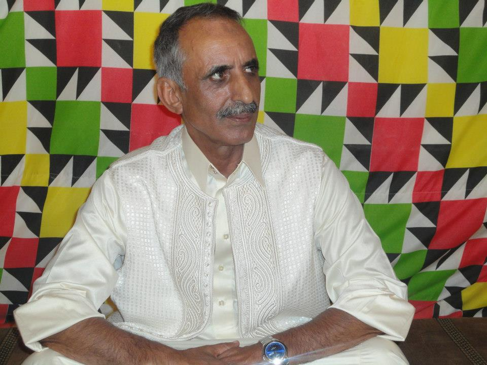 علي الساعدي الفاخري